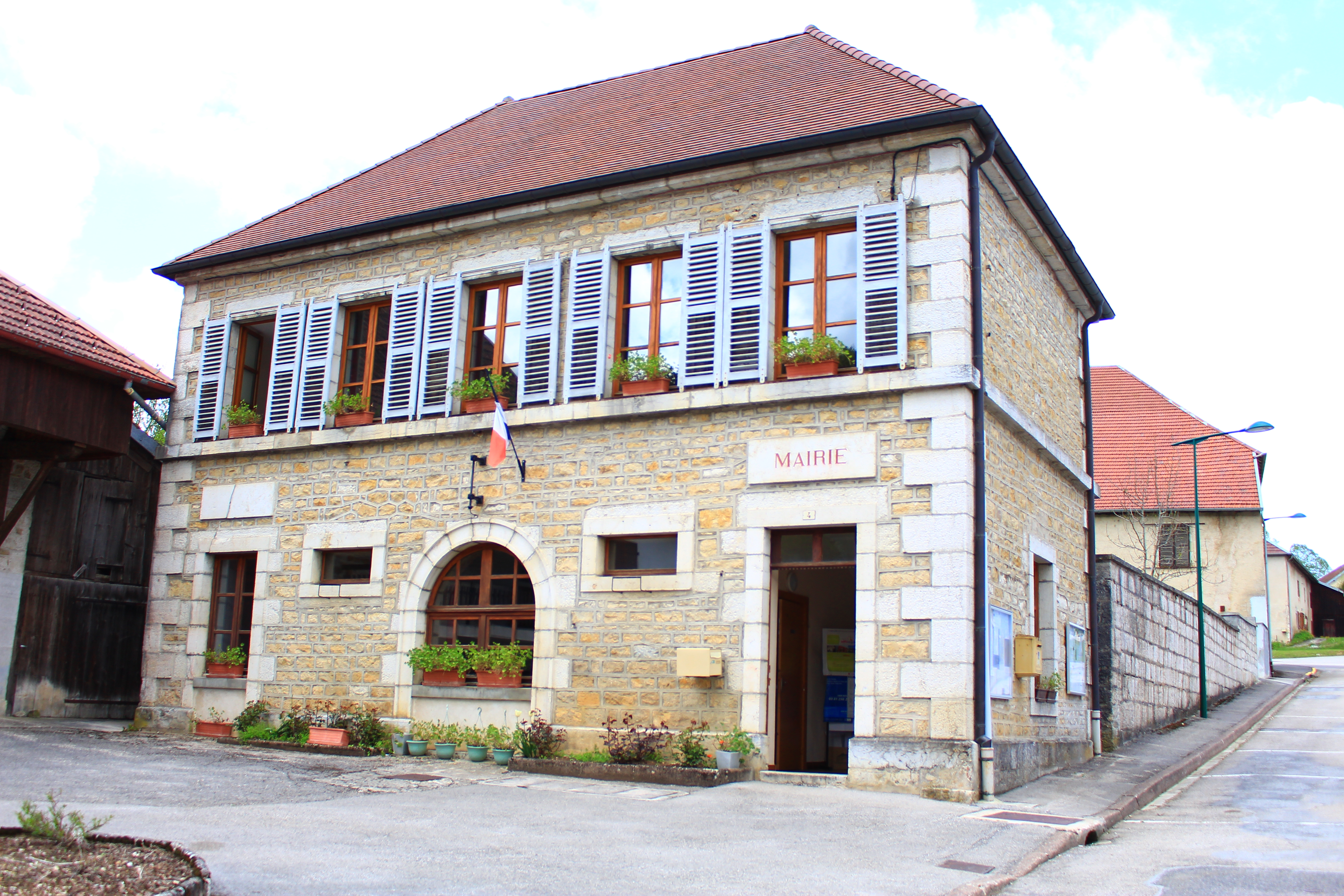 Mairie de Chapelle d'Huin (Doubs) Mai 2016